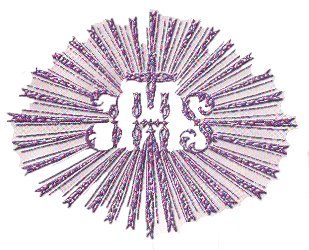 Emblema de la Archicofradía de Ntro. Padre Jesús Nazareno de Ocaña (Toledo)